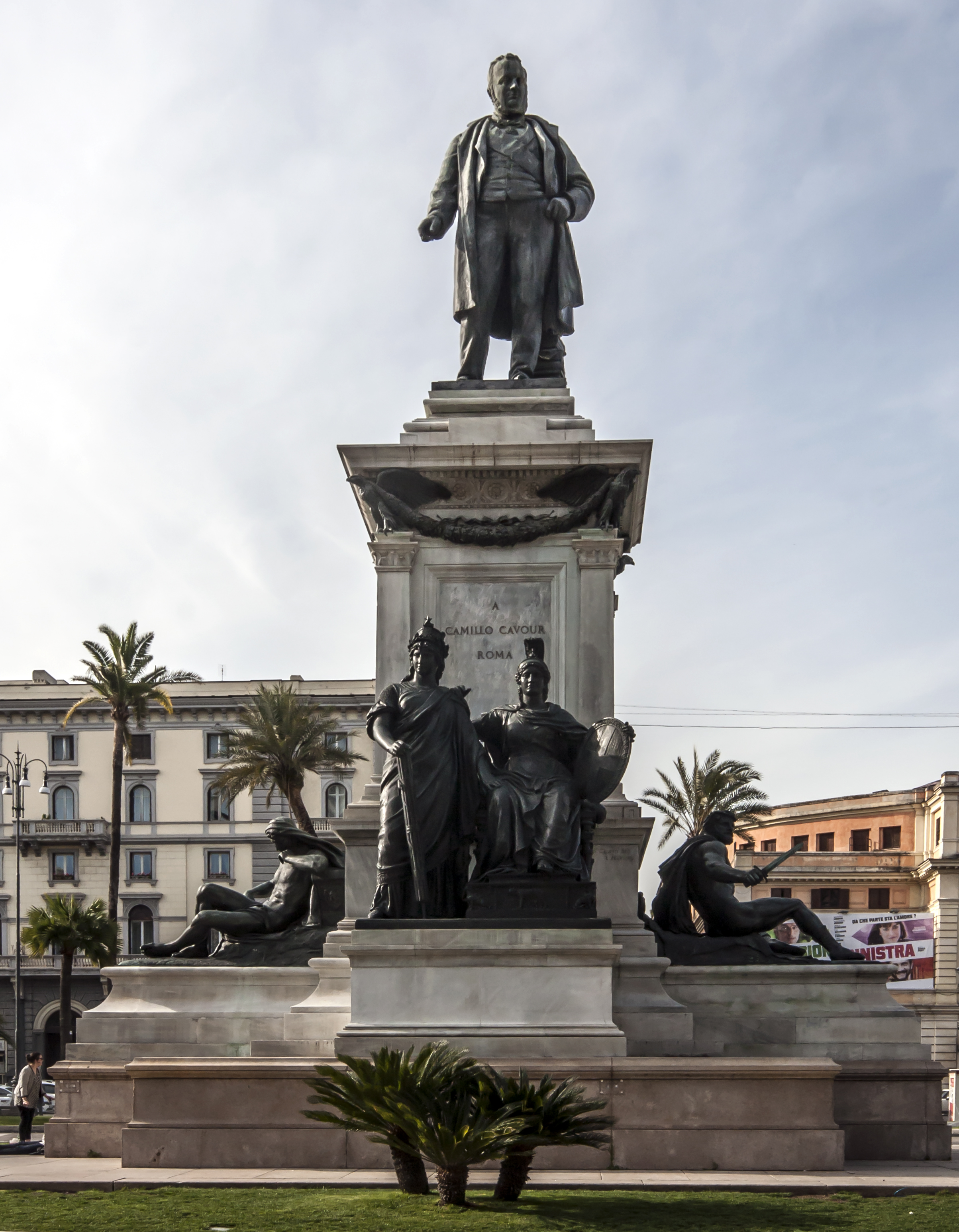 Staty i Rom av greve Camillo Benso di Cavour.